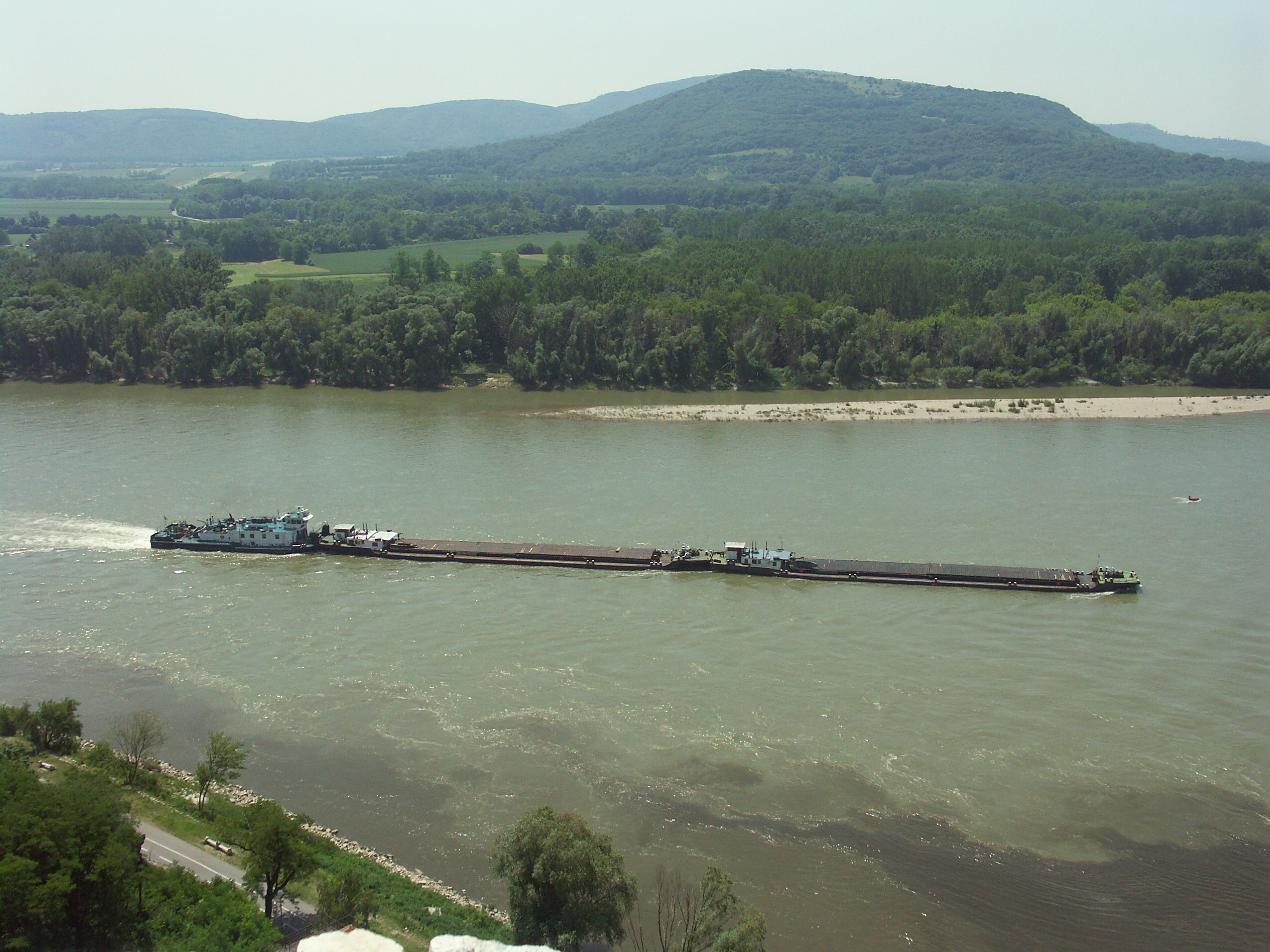 Remorker na Dunaji pri Devíne (Slovakia, Dunaj river)